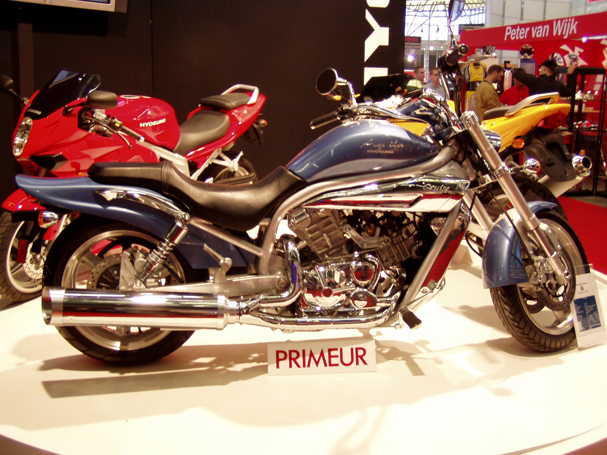 Toestemming van Tom Smeets